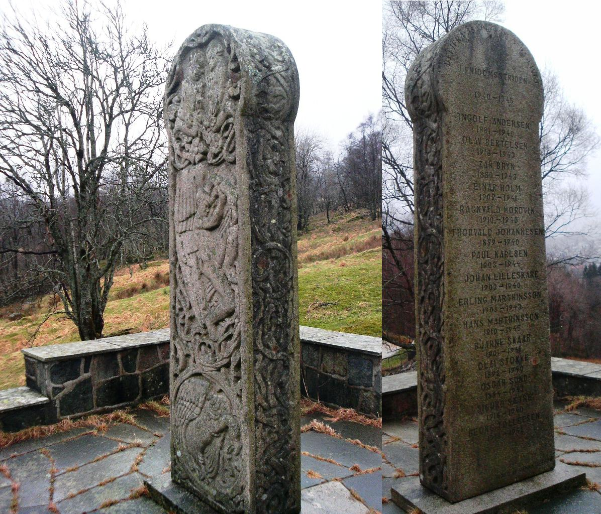 Minnebauta falne 2.verdenskrig i Åsane